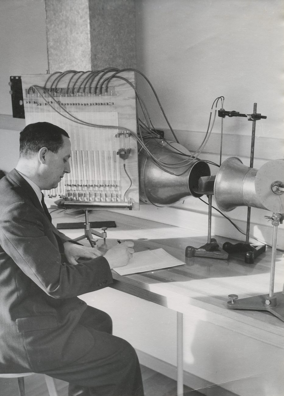 DIG93732. Professor Helmer Bäckström, på hans arbetsplats vid, institutionen för fotografi vid Kulngliga Tekniska Högskolan.